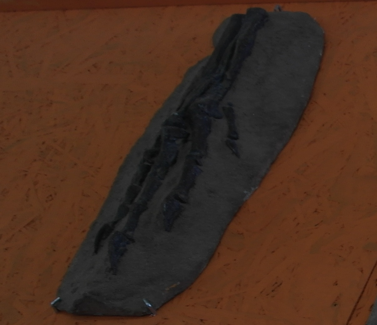 Копия ступни овирапторозавра Chirostenotes pergracilis в музее естественной истории «Палеопарк», Республика Алтай, Россия.